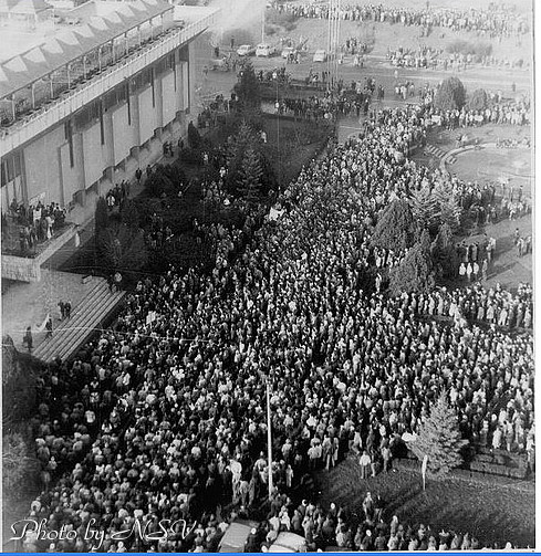 Poza realizata de pe Hotelul Interontinental pe 22 decembrie 1989, scanata dupa poza alb-negru